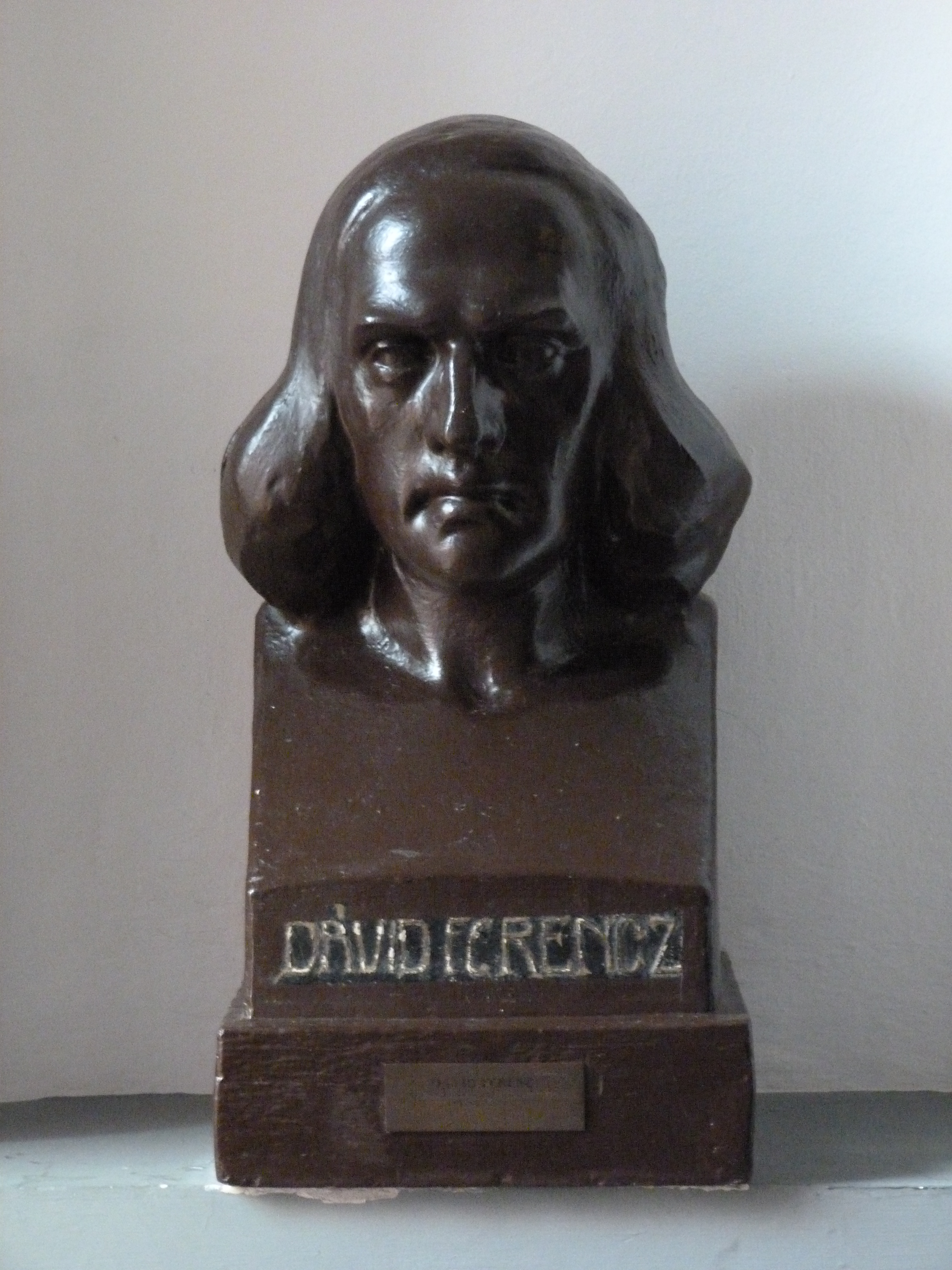 A felvétel 2014. december 14-én készült. Budapesti Unitárius Egyházközség, Belváros. Nagy Ignác utca 2-4 szám. Dávid Ferenc szobra.